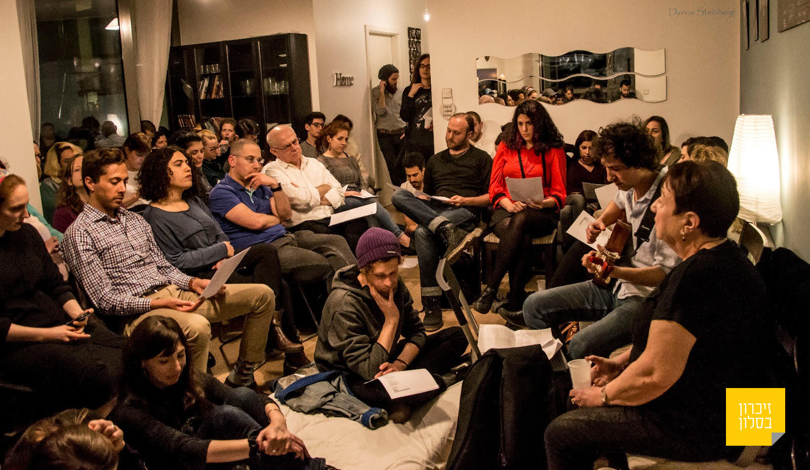 ערב זיכרון בסלון